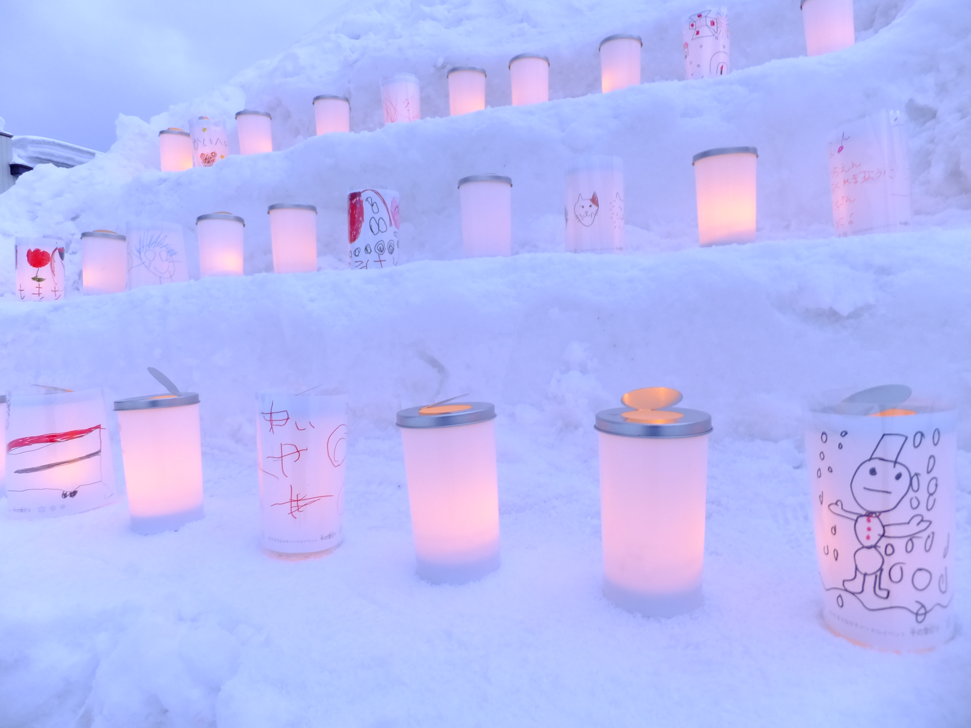 秋田県湯沢市の小正月行事・犬っこまつり（2015年） This photo has been taken in the country: Japan